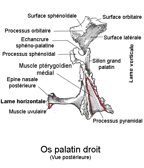 Os palatin. Anatomie humaine